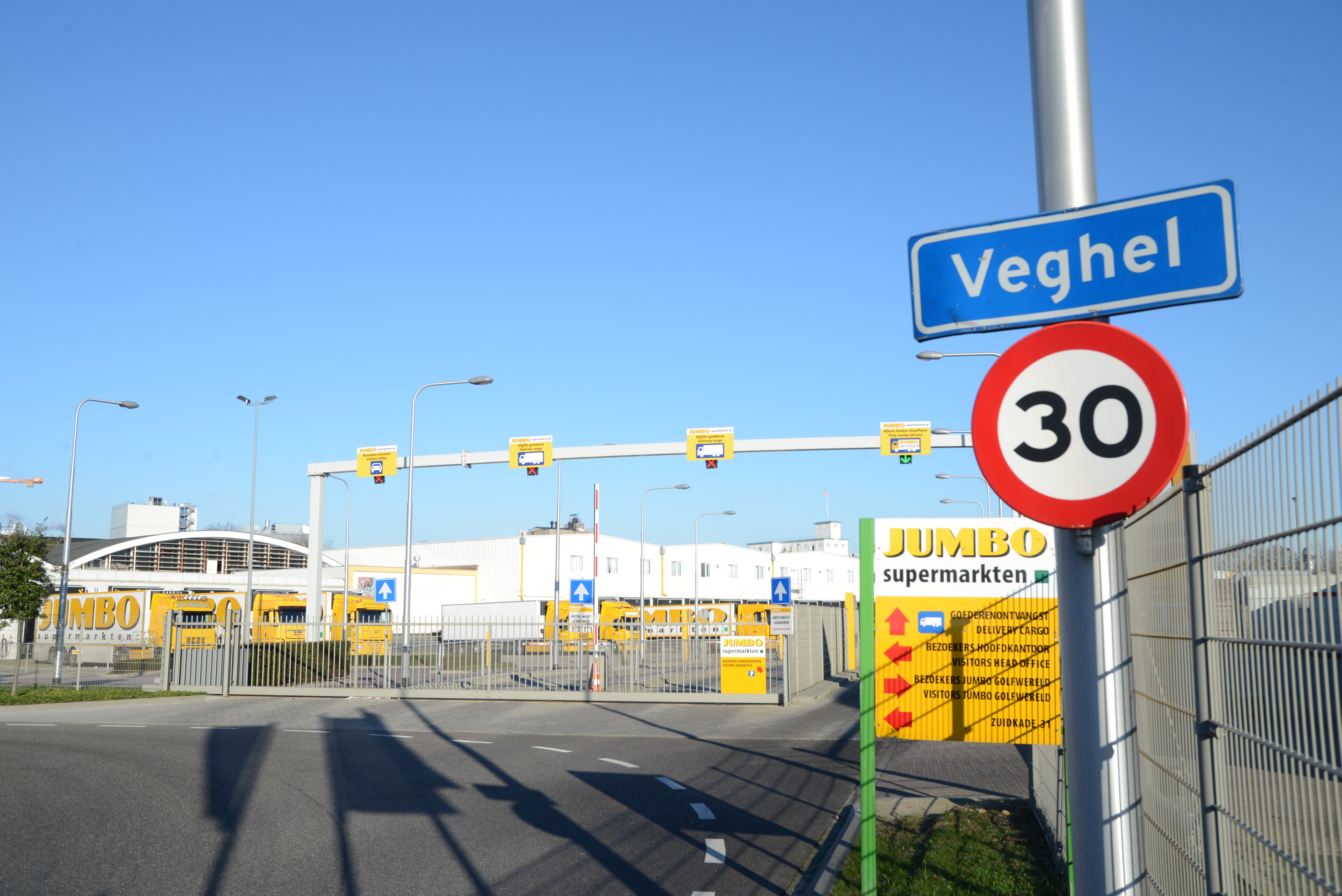 Distributiecentrum van Jumbo Supermarkten in Veghel, aan de N279, Zuid-Willemsvaart en Zuidkade